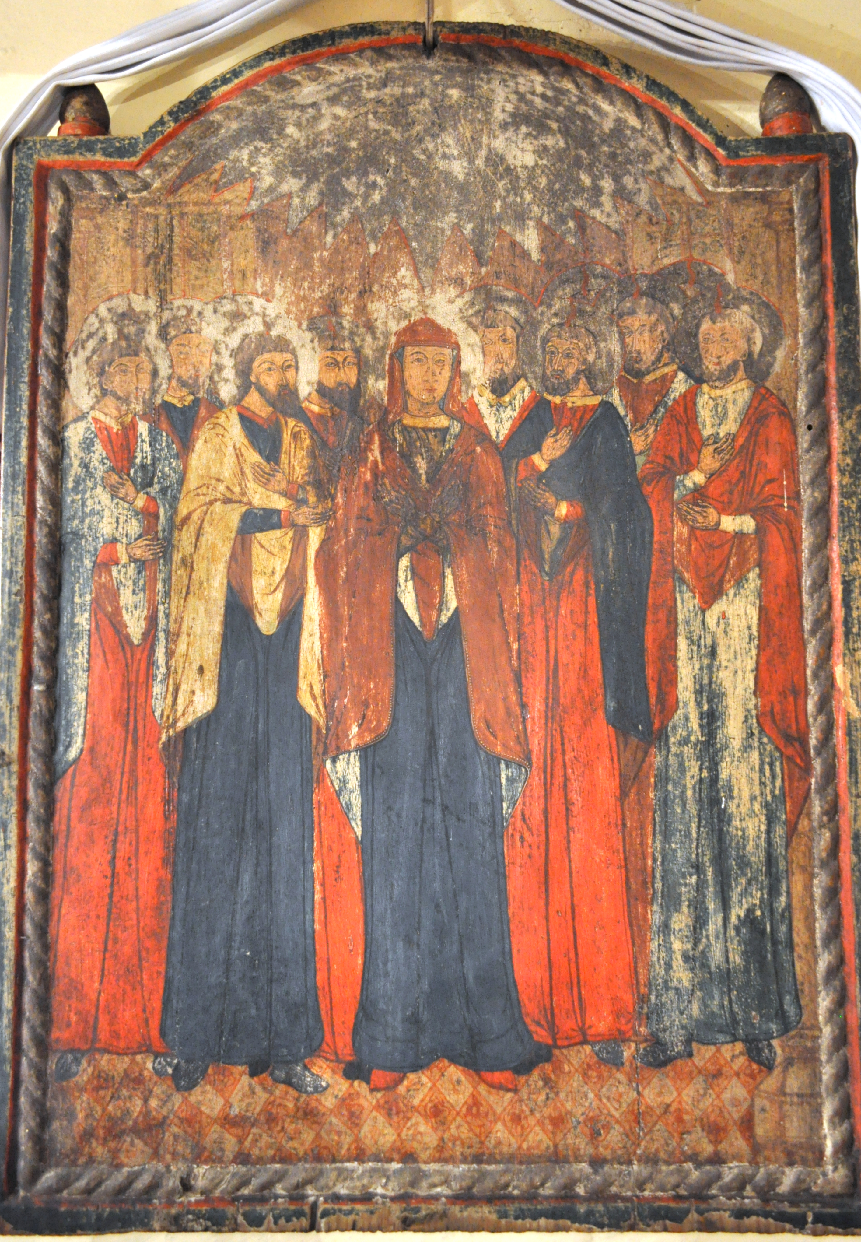 Biserica de lemn din Dâncu, județul Cluj